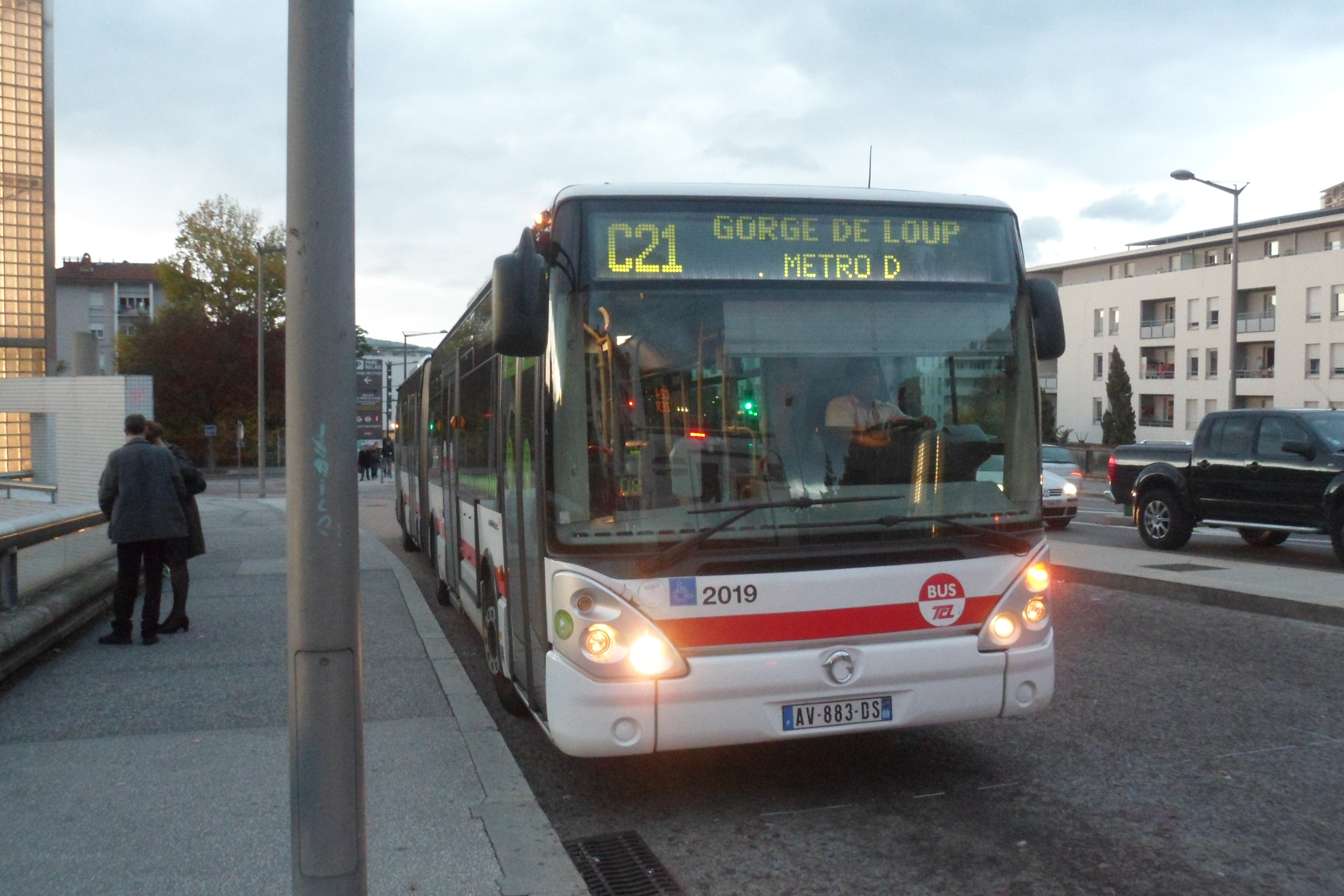 Irisbus Citelis 18 - Ligne C21 du réseau TCL - Gorge de Loup